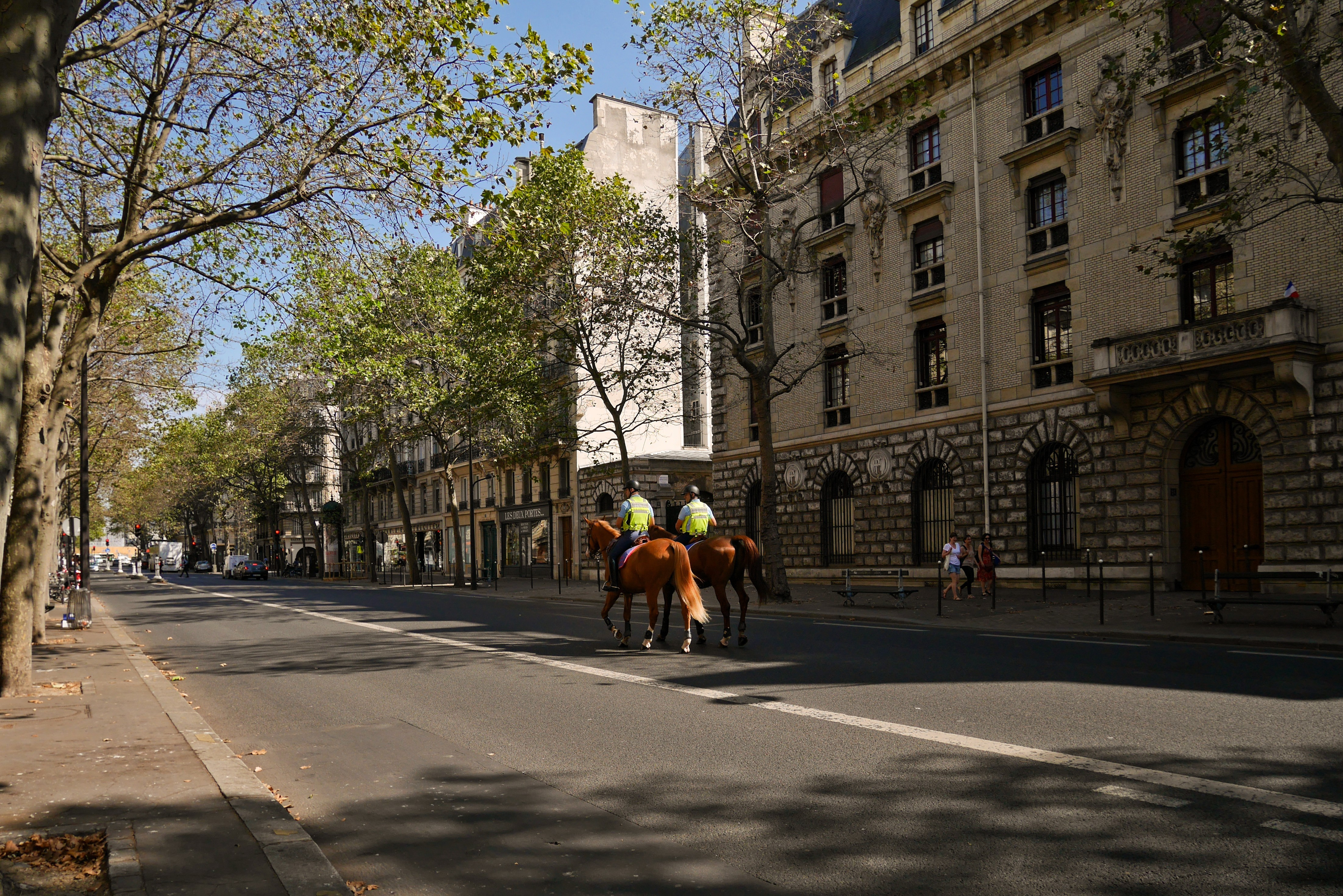 Caserne des Célestins, Boulevard Henri-IV, Paris.